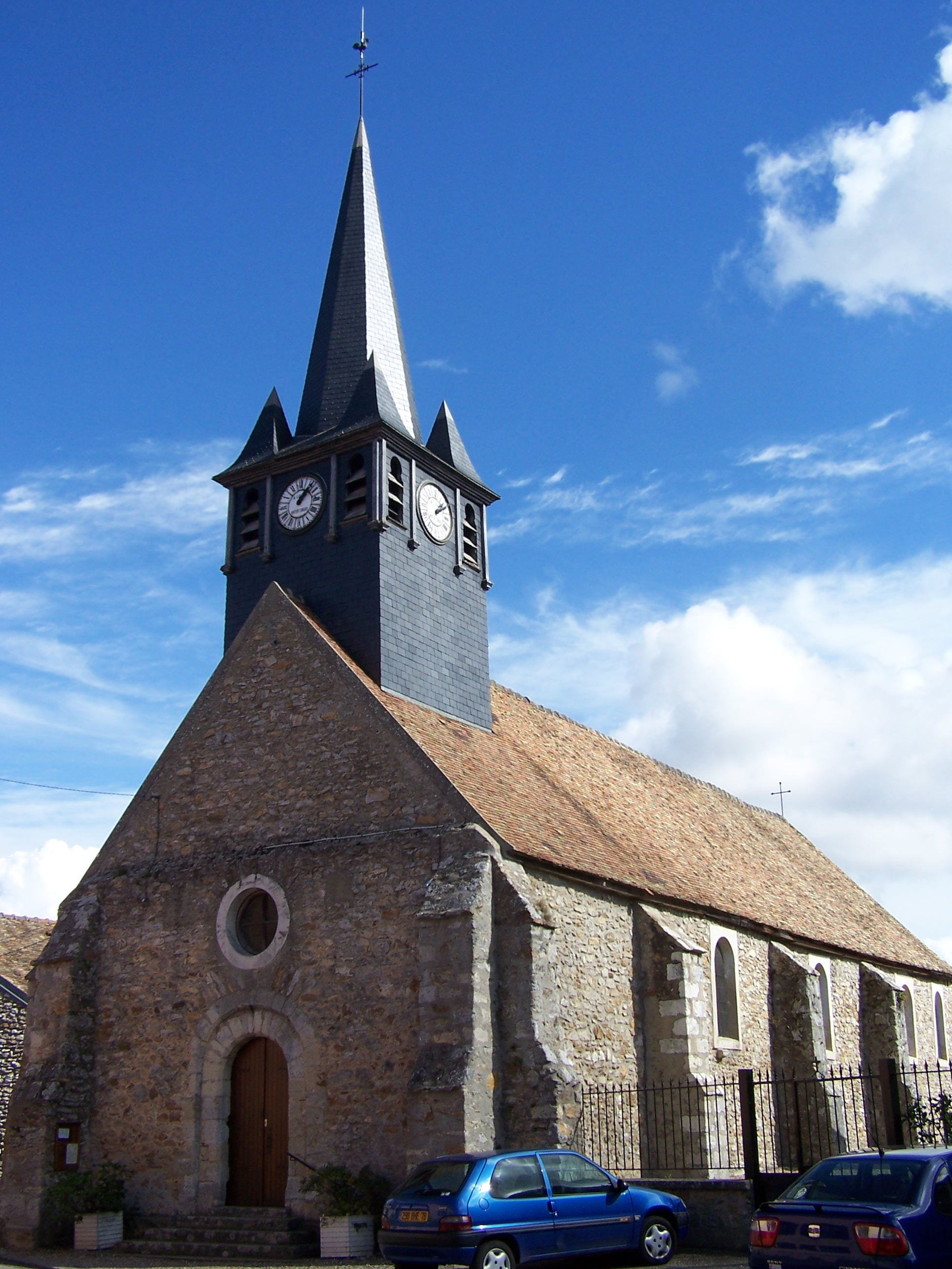 Église de Boissy-sans-Avoir (Yvelines, France)